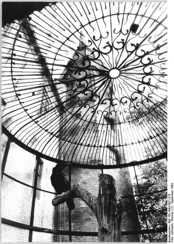 Merseburg, Vogelkäfig, Rabe ADN-ZB Lehmann 21.9.1983 Bez. Halle: Was für die Berliner der Bär, ist für die Merseburger der Rabe. Das Wappentier, ein Kolkrabe, "residiert" in einem schmiedeeisernen Käfig vor dem Schloß. Die Sage berichtet, daß Bischof Thilos von Trotha seinen Diener wegen des angeblichen Diebstahls eines wertvollen Ringes hinrichten ließ. Später stellte sich heraus, das ein Rabe den Ring stahl. Deshalb ziert dieser Vogel als nachträgliche Rehabilation des Dieners das Stadtwappen und den Eingangsbereich des Schlosses. (siehe auch 14 und 15N)